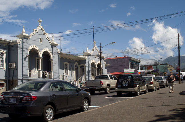 Coronado, Costa Rica